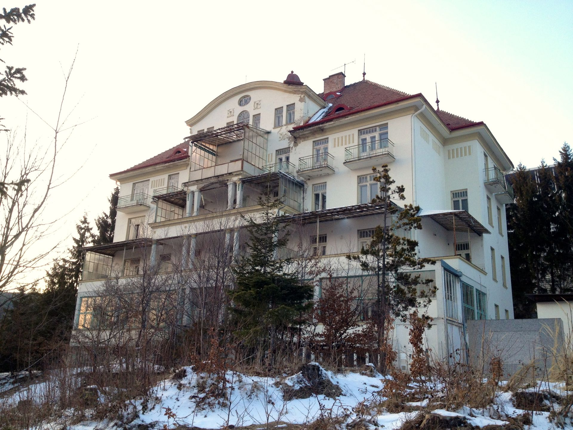 NÖ Landeskrankenhaus, Sonderheilanstalt für Lungenkrankheiten